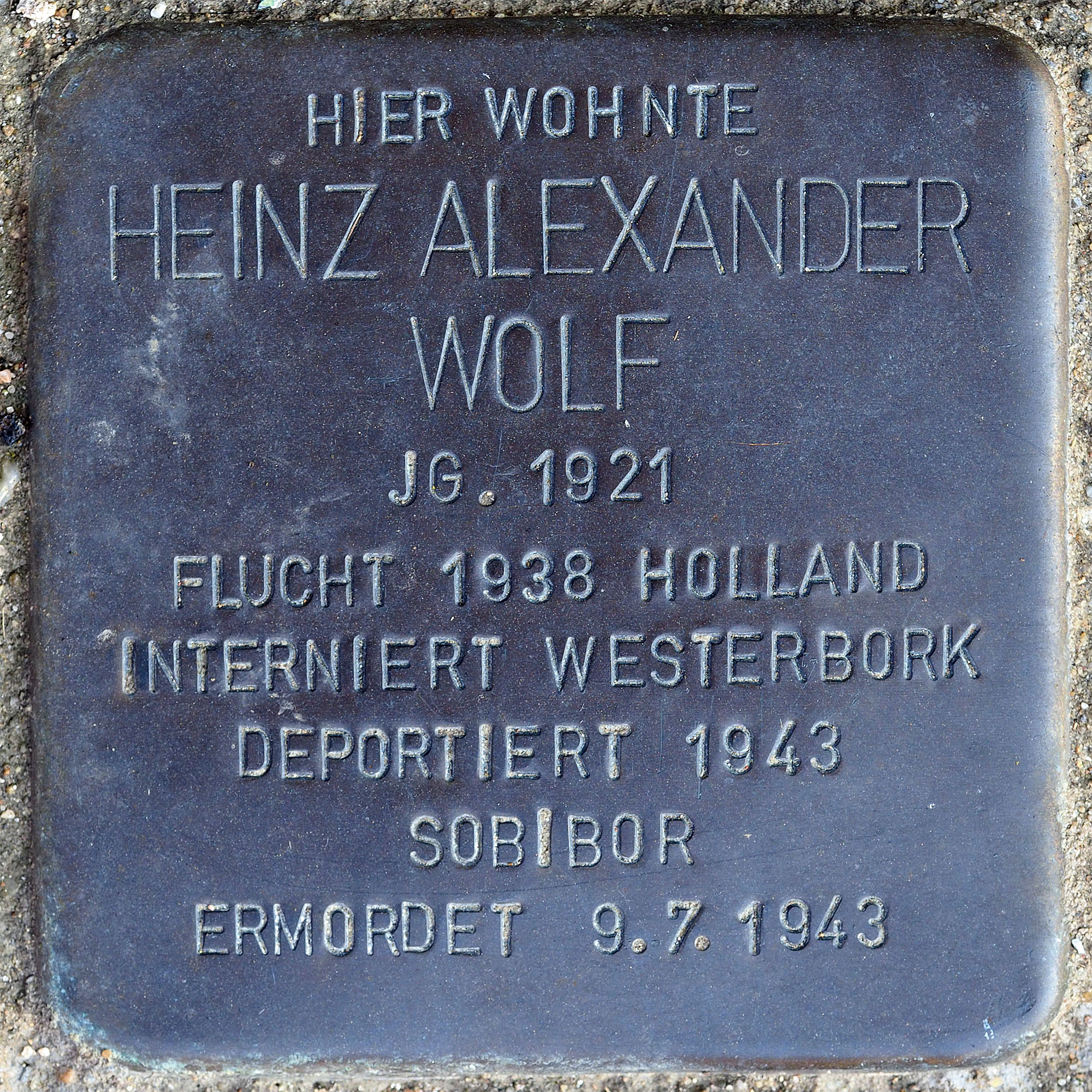 Stolpersteine GV: Wolf, Heinz-Alexander